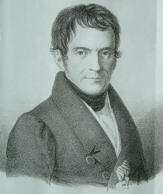 PD Johann Georg Heine